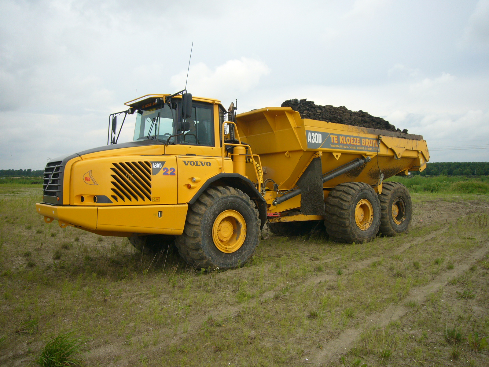 Volvo A30D.